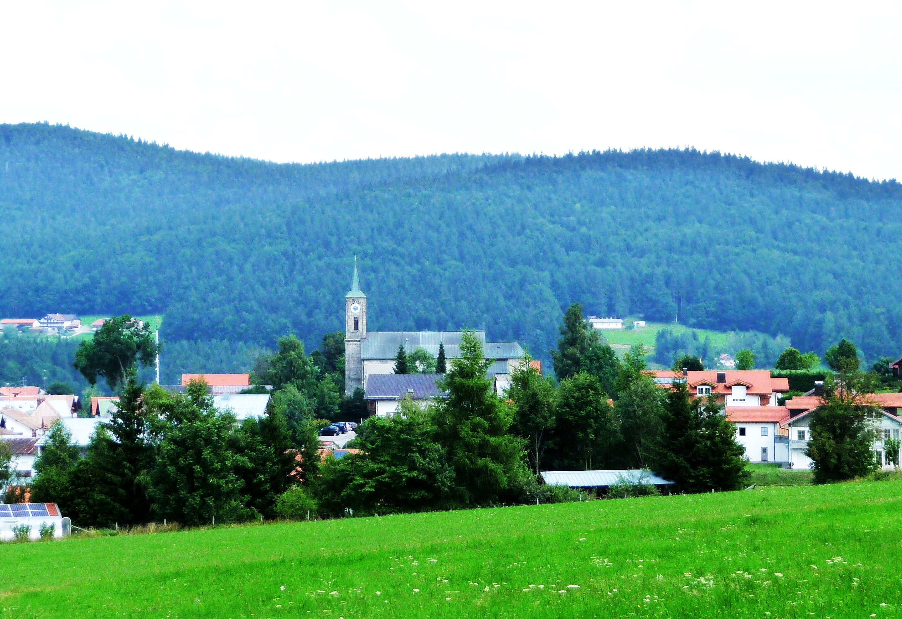 Blick auf Herzogsreut